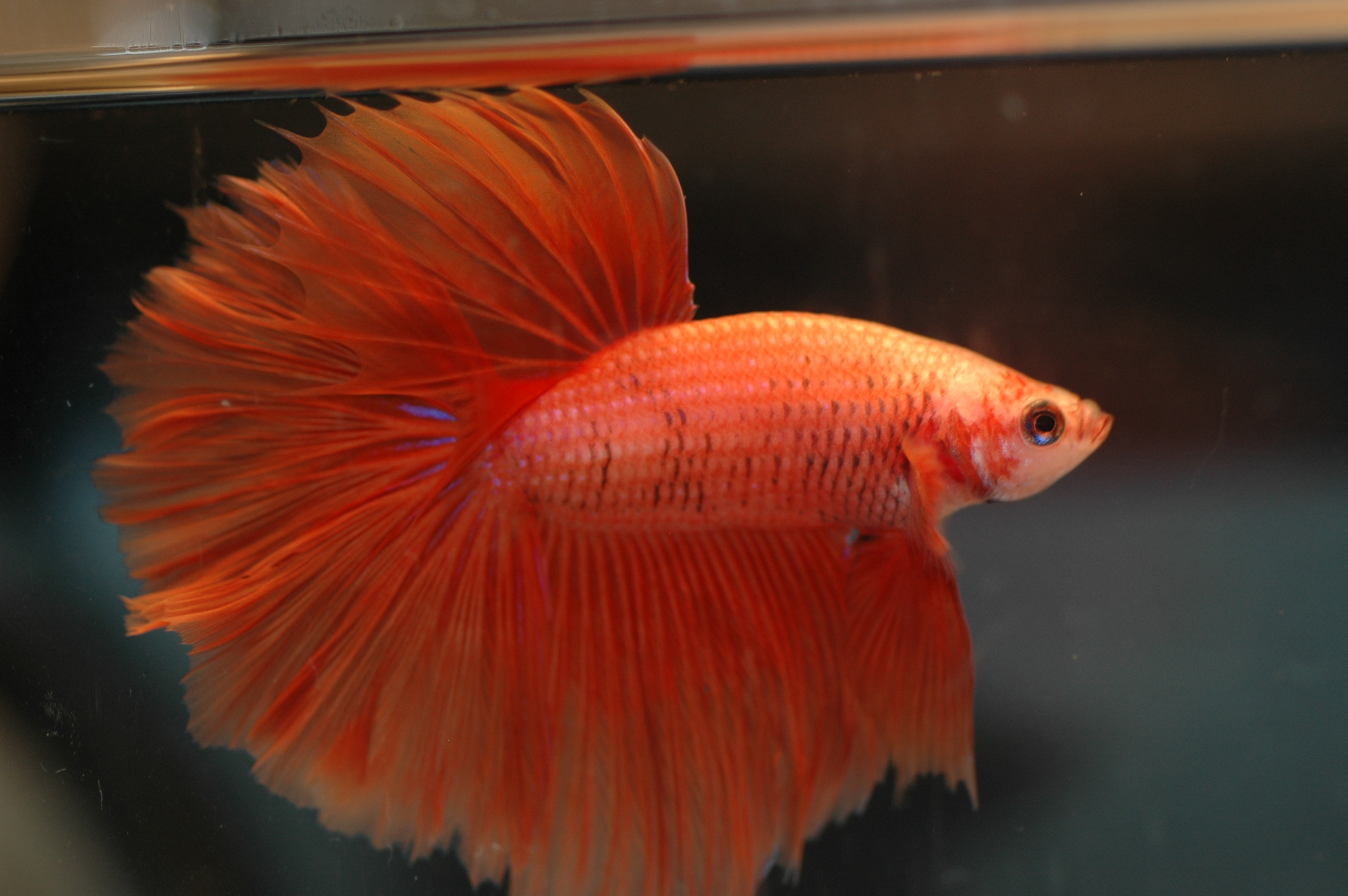 Betta splendens, male, orange halfmoon.